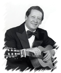 Alfredo Gil con su Requinto integrante del (Trio Los Panchos) Creador del Requinto